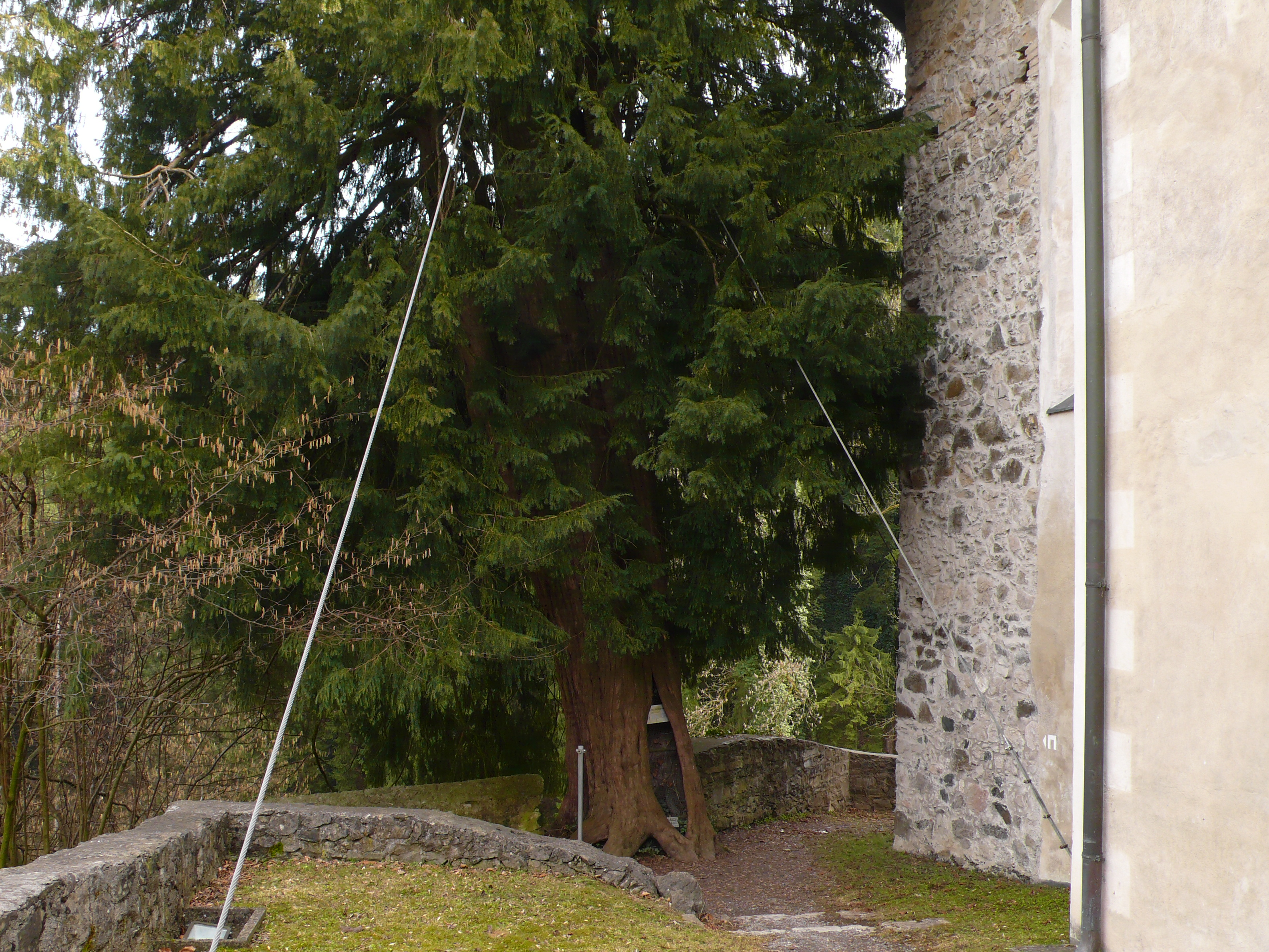 Pfarrkirche St. Corneli, tausendjährige Eibe, Feldkirch-Tosters